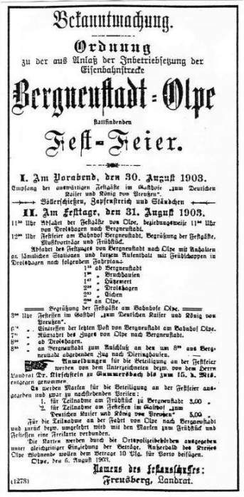 „Bekanntmachung - Ordnung zu der aus Anlass der Inbetriebsetzung der Eisenbahnstrecke Bergneustadt-Olpe stattfindenden Fest-Feier“